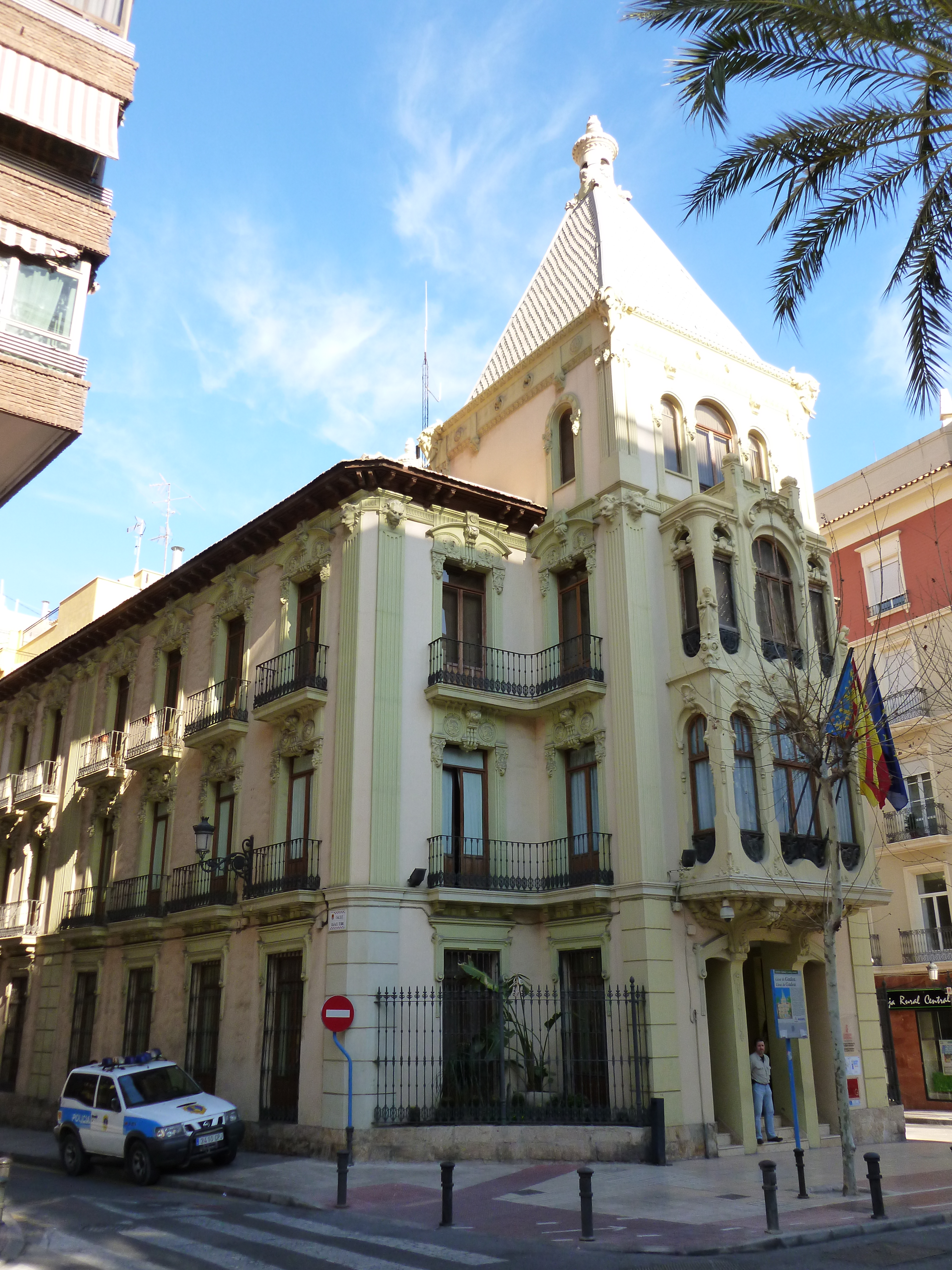 Casa de les Bruixes (Alacant) 32.014-037.